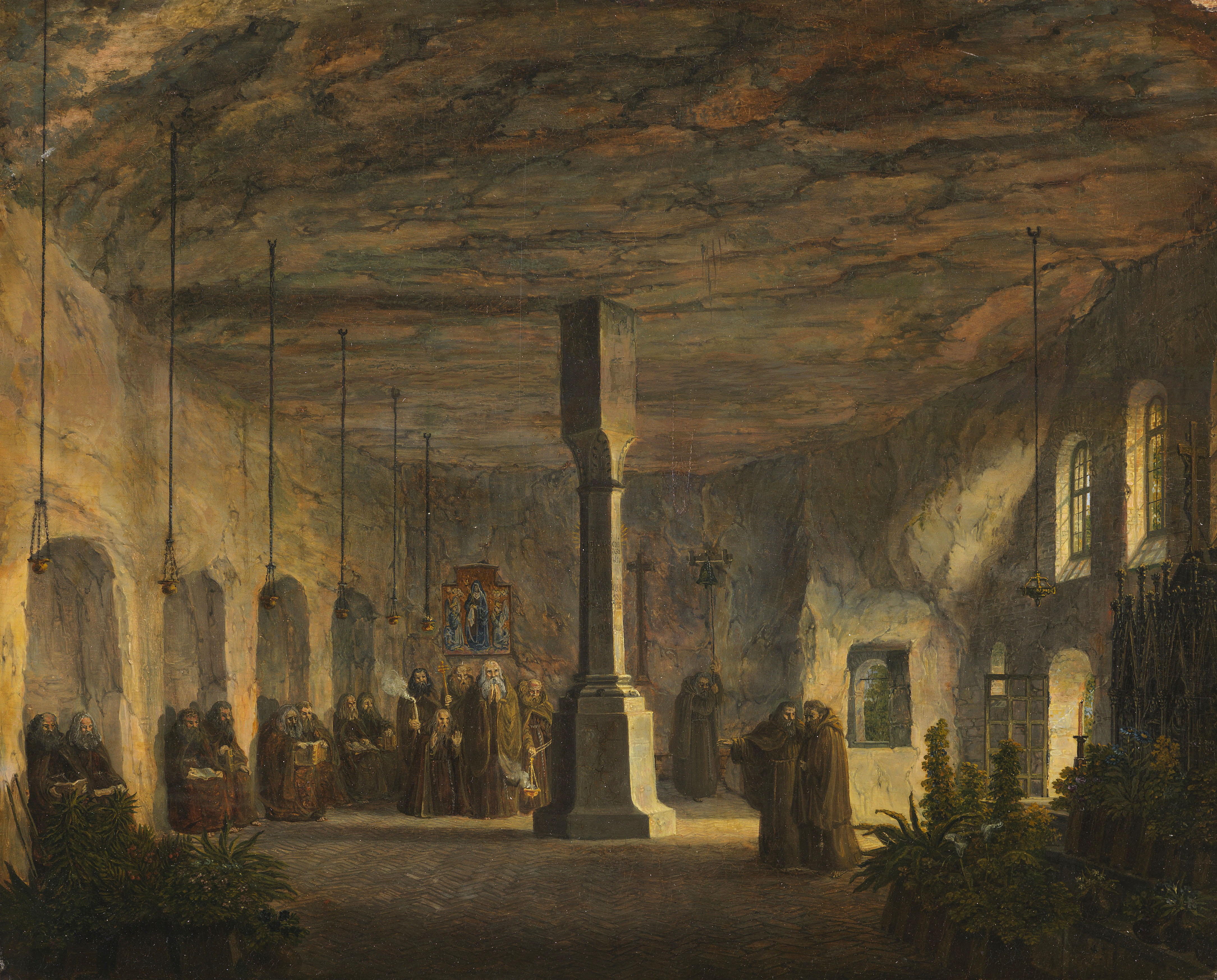 Innenansicht der St. Maximuskapelle in Salzburg (Petersfriedhof). 1818. Öl auf Holz. 37 x 46,5 cm Trost VG 19.